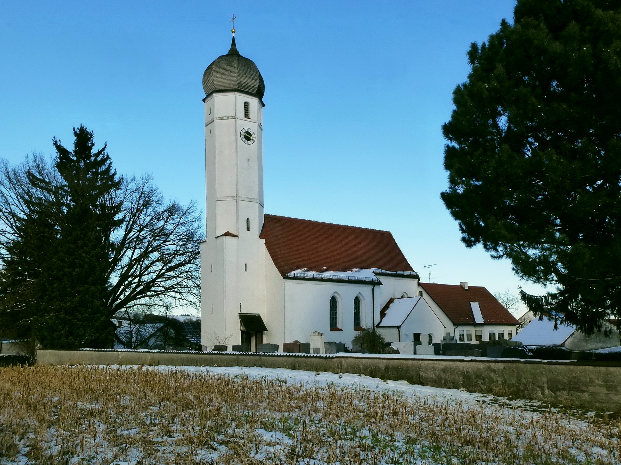 Bergkirchen -OT Deutenhausen- Kirchweg 3: Katholische Filialkirche St. Nikolaus. Ansicht von SW